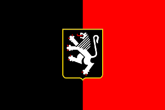 Bandiera della Valle d'Aosta